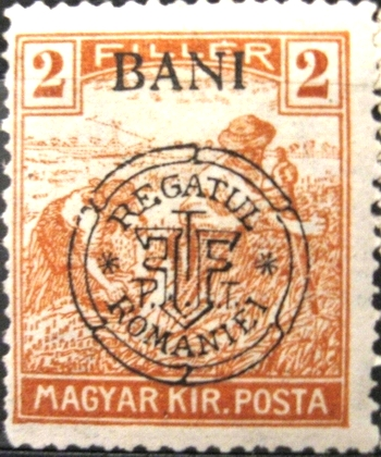 Marcă poştală din Emisiunea Cluj (27 iunie 1919). Supratipar românesc aplicat mărcilor ungureşti rămase în stocul oficiului poştal din Cluj. Mărcile poştale din Emisiunea Cluj (ca şi cele din Emisiunea Oradea) au circulat preponderent în Transilvania, dar într-o măsură mult mai redusă, chiar şi în Vechiul Regat.